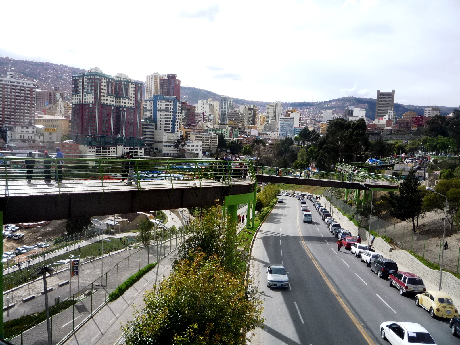 via balcon la paz Bolivia